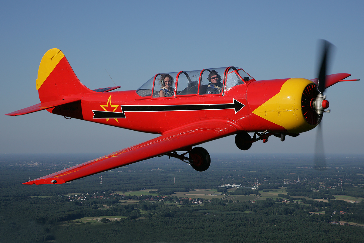 Yak-52 RA-3085K